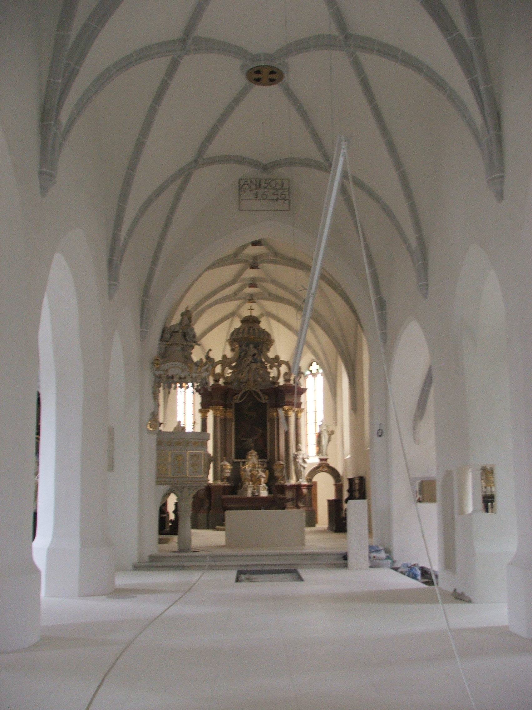 Pezinok-Kostol Nanebovzatej Panny Márie